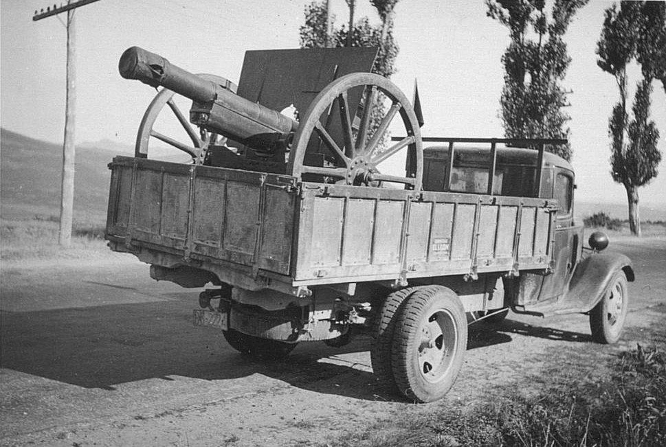 Cañón de campaña Schneider 75/28 modelo 1906 transportado por un camión durante la Guerra Civil Española